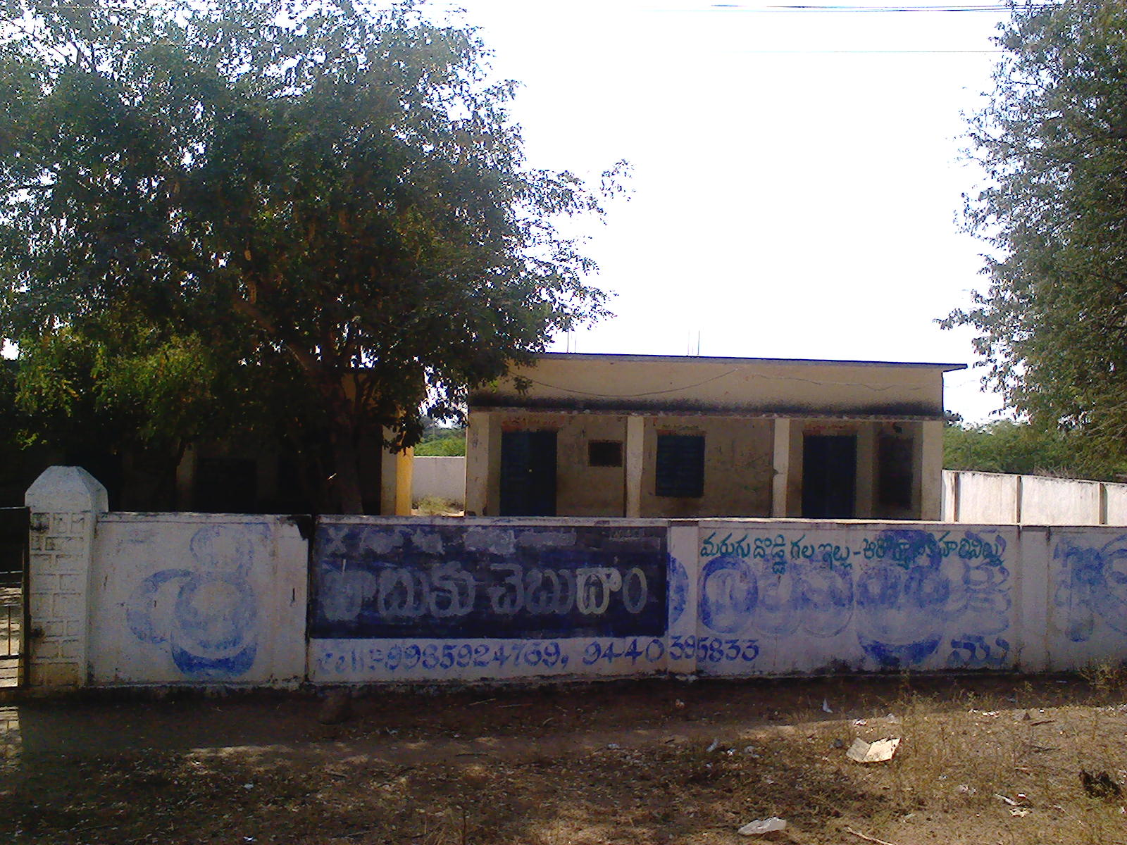 ప్రాథమిక పాఠశాల, పెద్దపల్లి